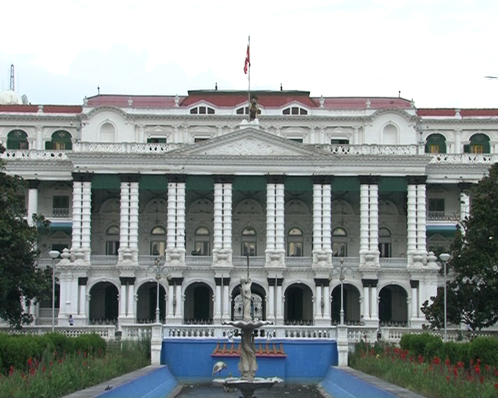 नेपाली: Nepali palace.